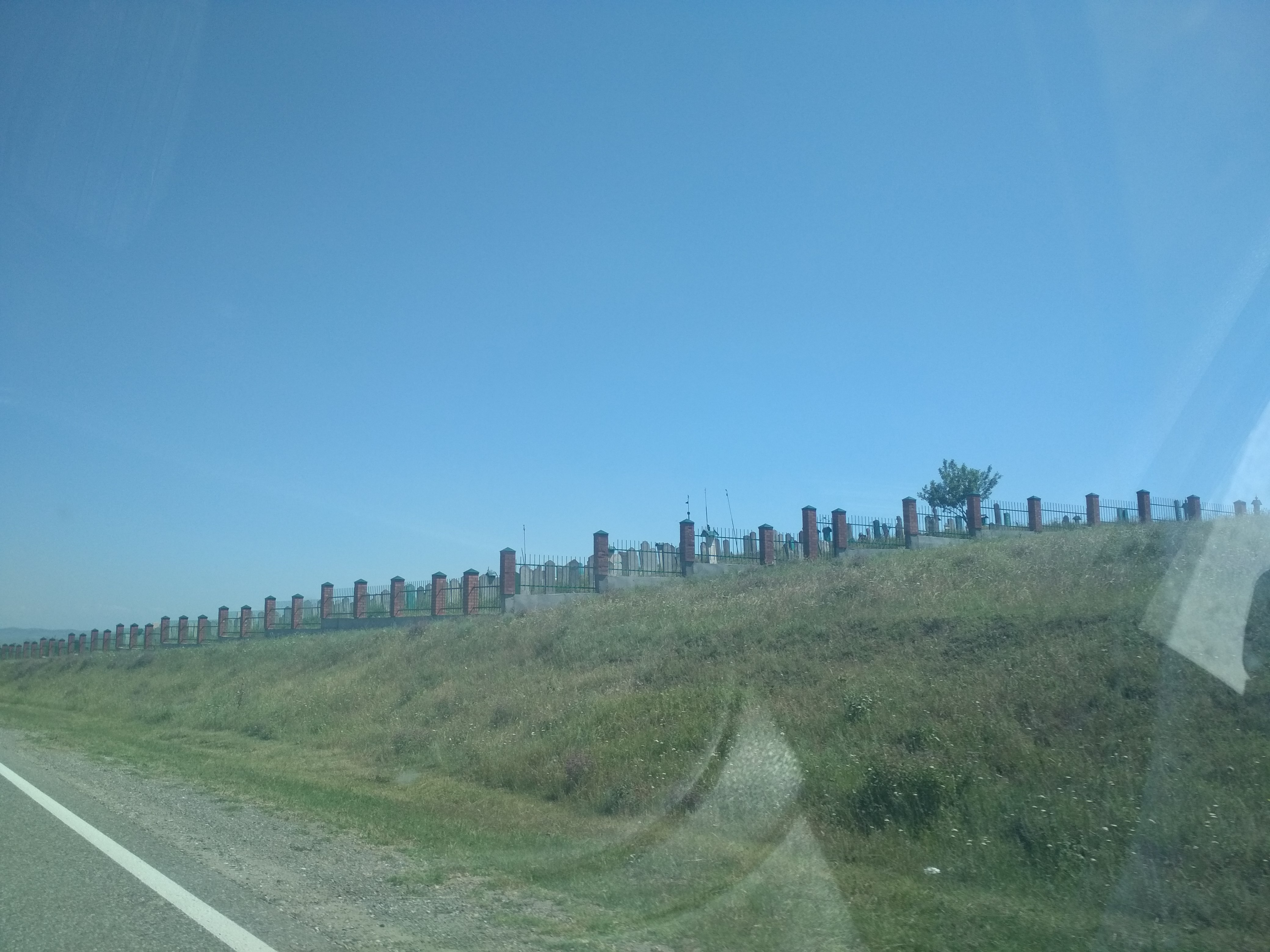 Нохчийн: Горагорскан кешнаш